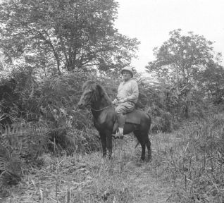 Negatief. De heer G.G. Slotemaker te paard tussen de gewassen Pteris en Olifantsgras op een onderneming te Redelong, Atjeh, Noord-Sumatra